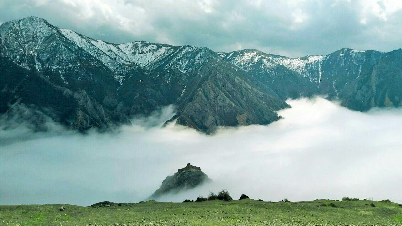 قلعه تاریخی کنگلو در روستای کنگلو شهرستان سوادکوه